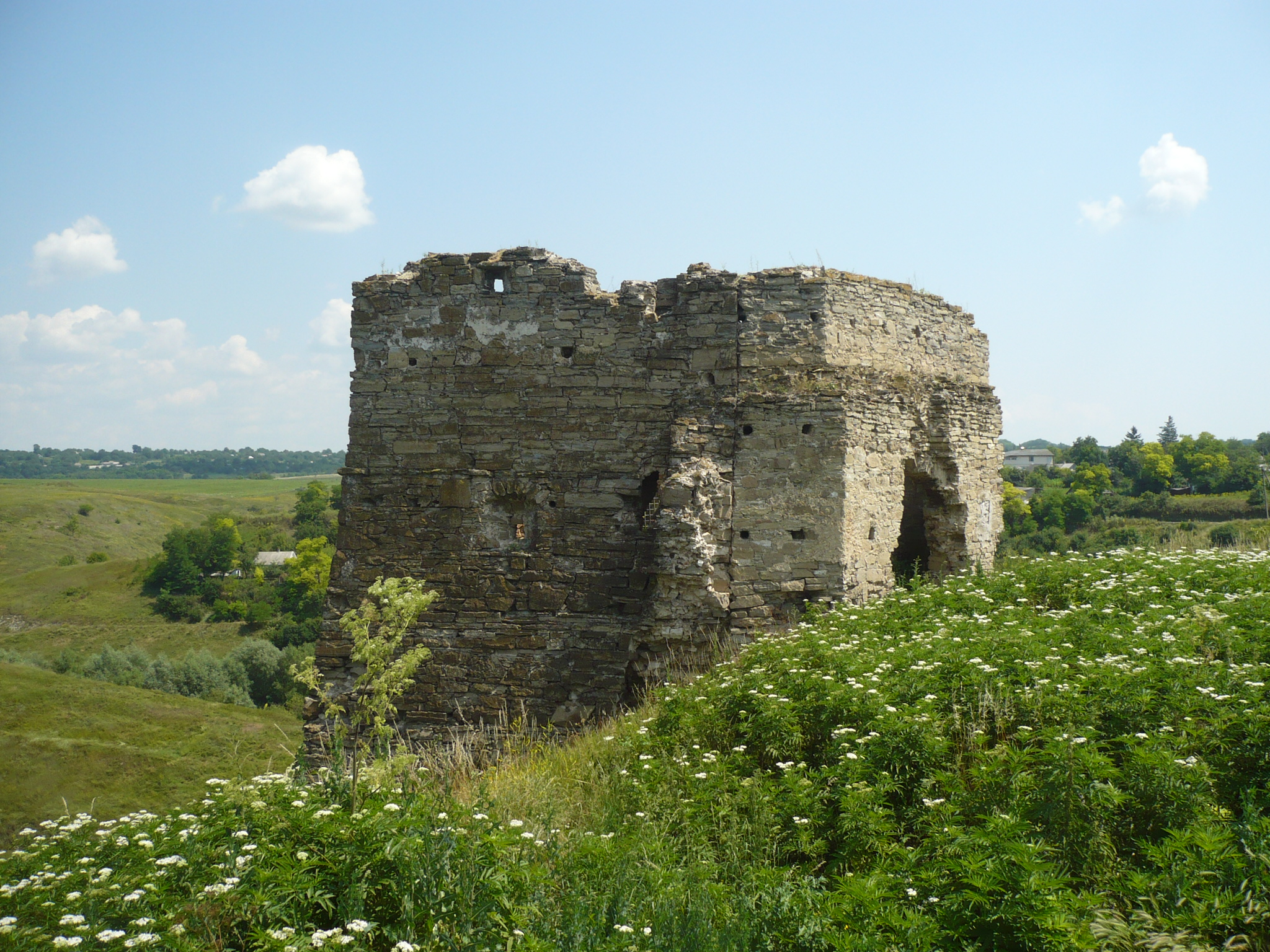 Zamek w Żwańcu